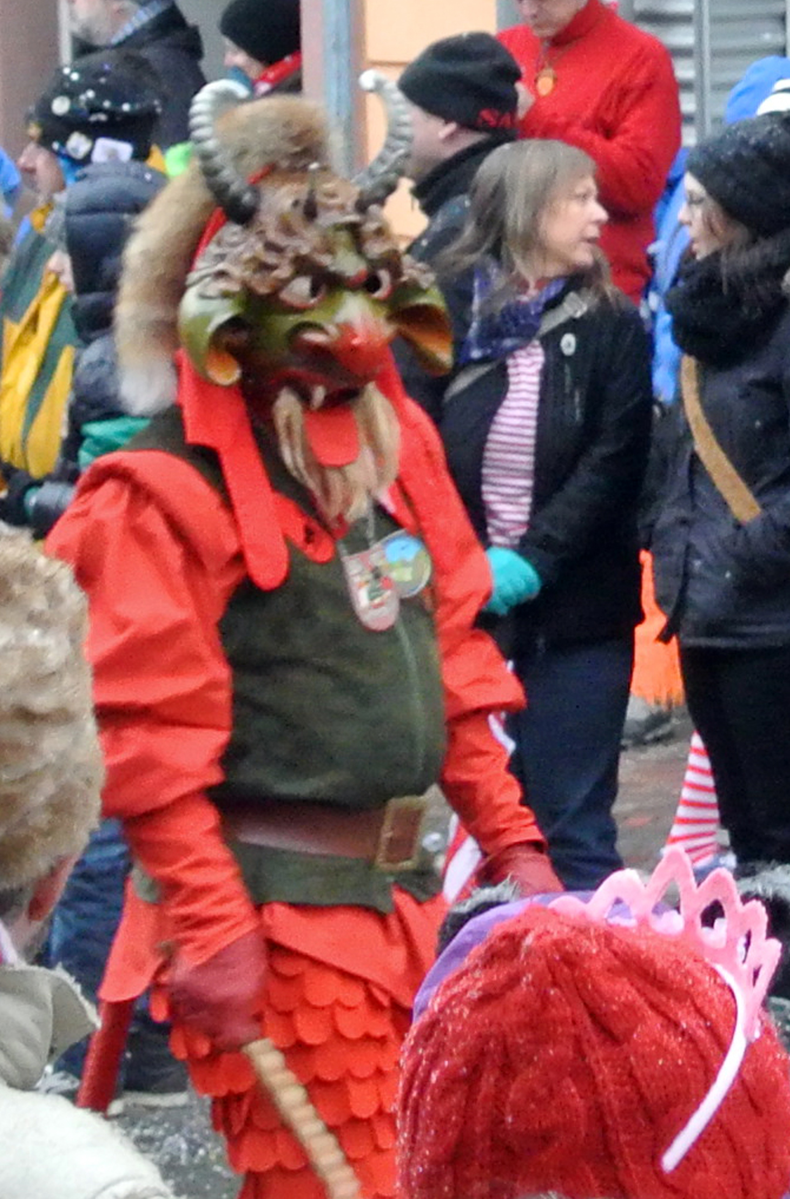 Teufel - Einzelfigur der Offenburger Hexenzunft e.V. beim Jubiläumsumzug 150 Jahre Narrenzunft Krakeelia Waldkirch e.V. am 01.02.2015